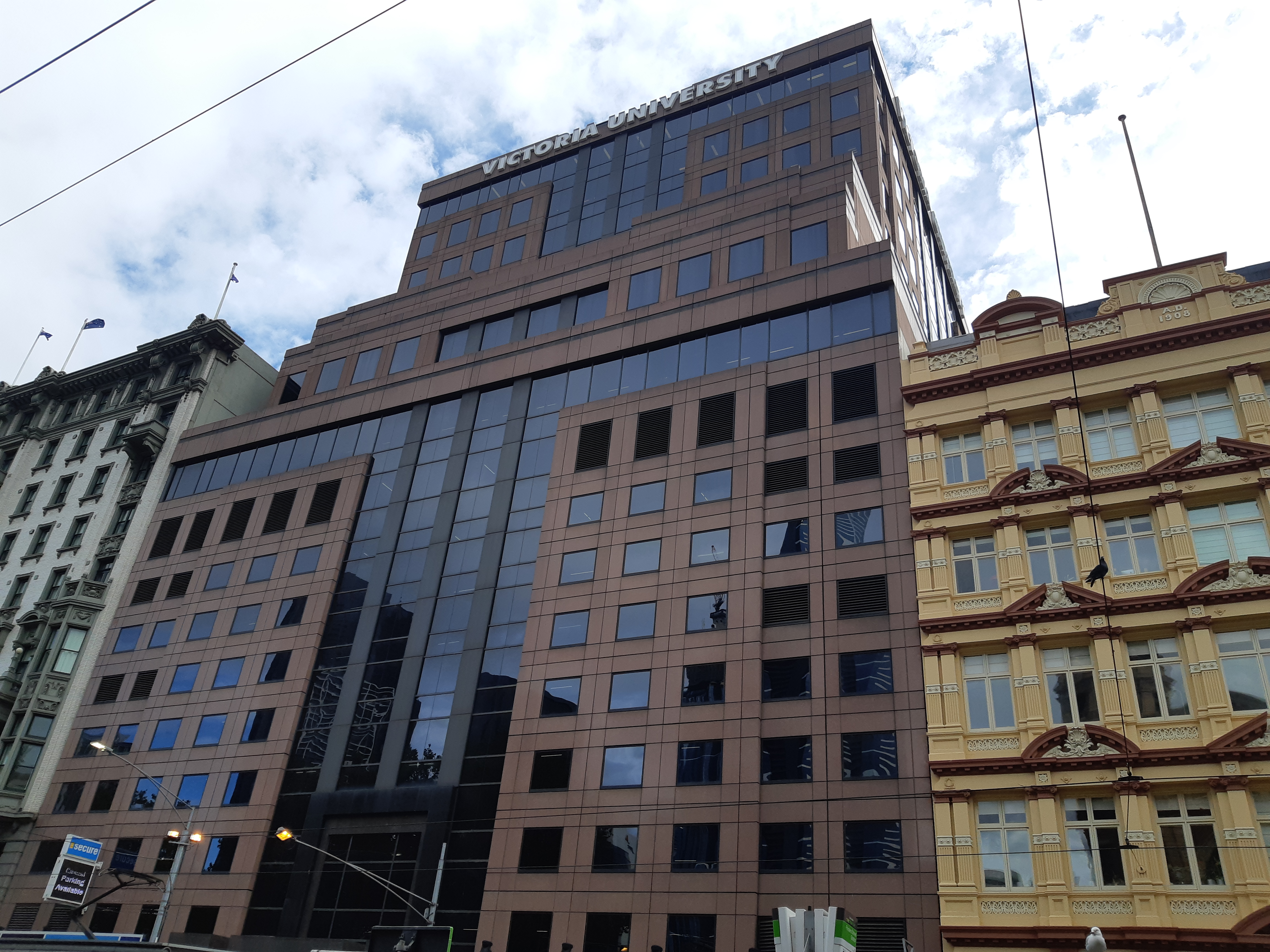 Kampus City Flinders, Universitas Victoria